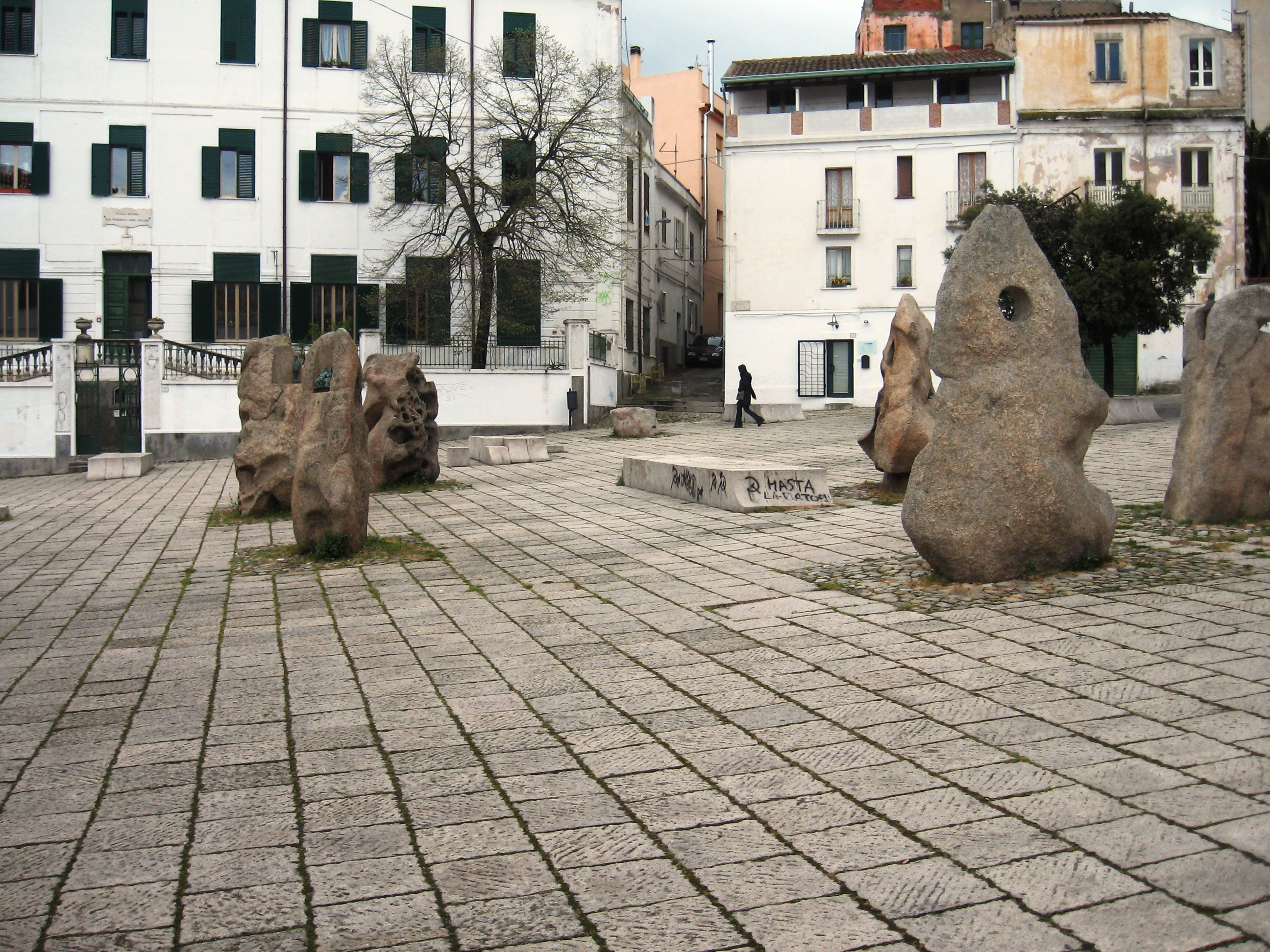 Piazza di Nuoro